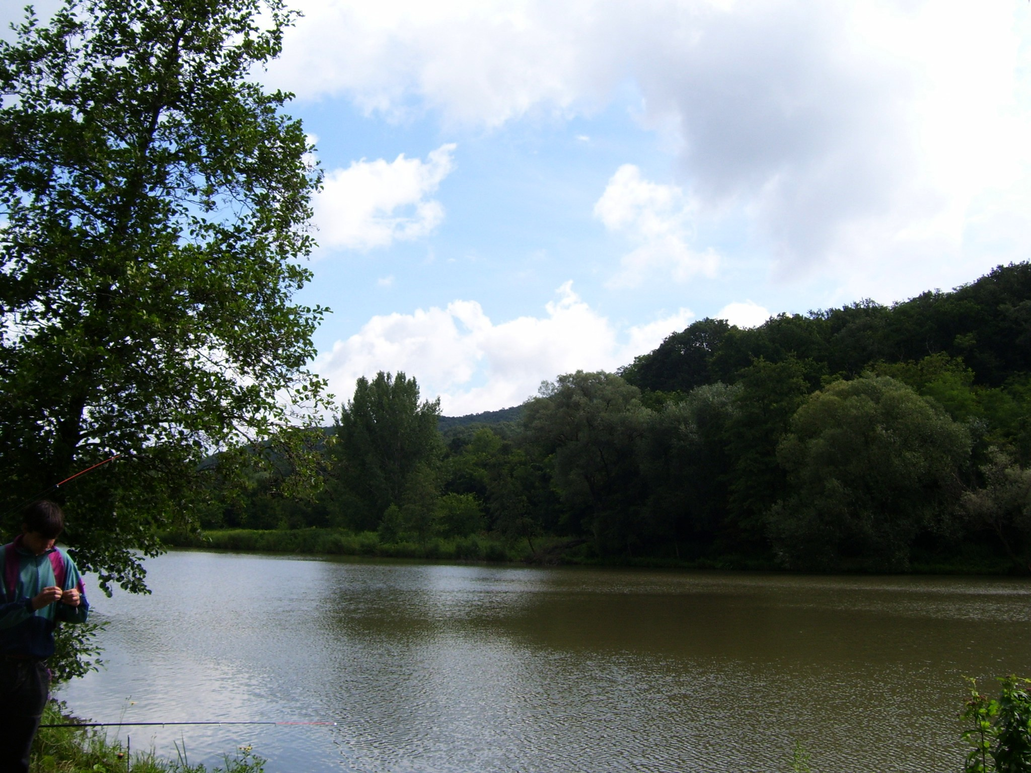 Búbánatvölgy a tóval (Esztergom)